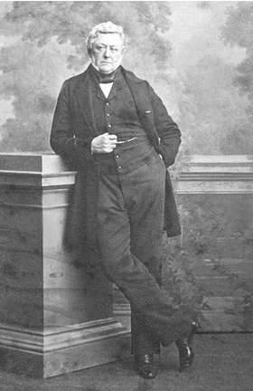 Ludovicus Johannes Baptista Van Sasse van Ysselt (1809-1888) kamerlid